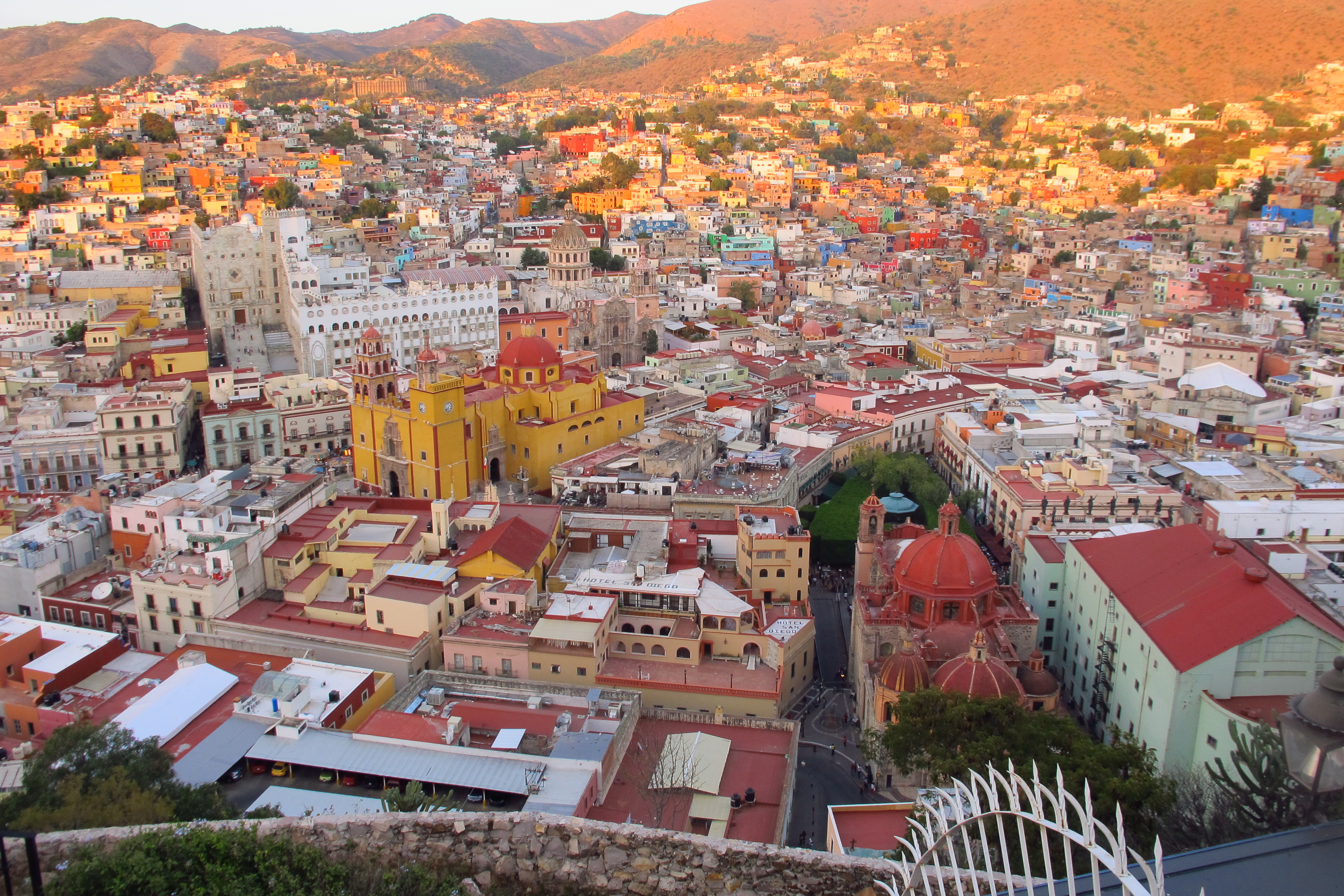 Guanajuato desde el Pípila